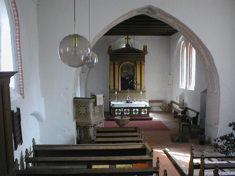 Chor der Kirche in Neukalen-Schorrentin, Mecklenburg-Vorpommern, Deutschland